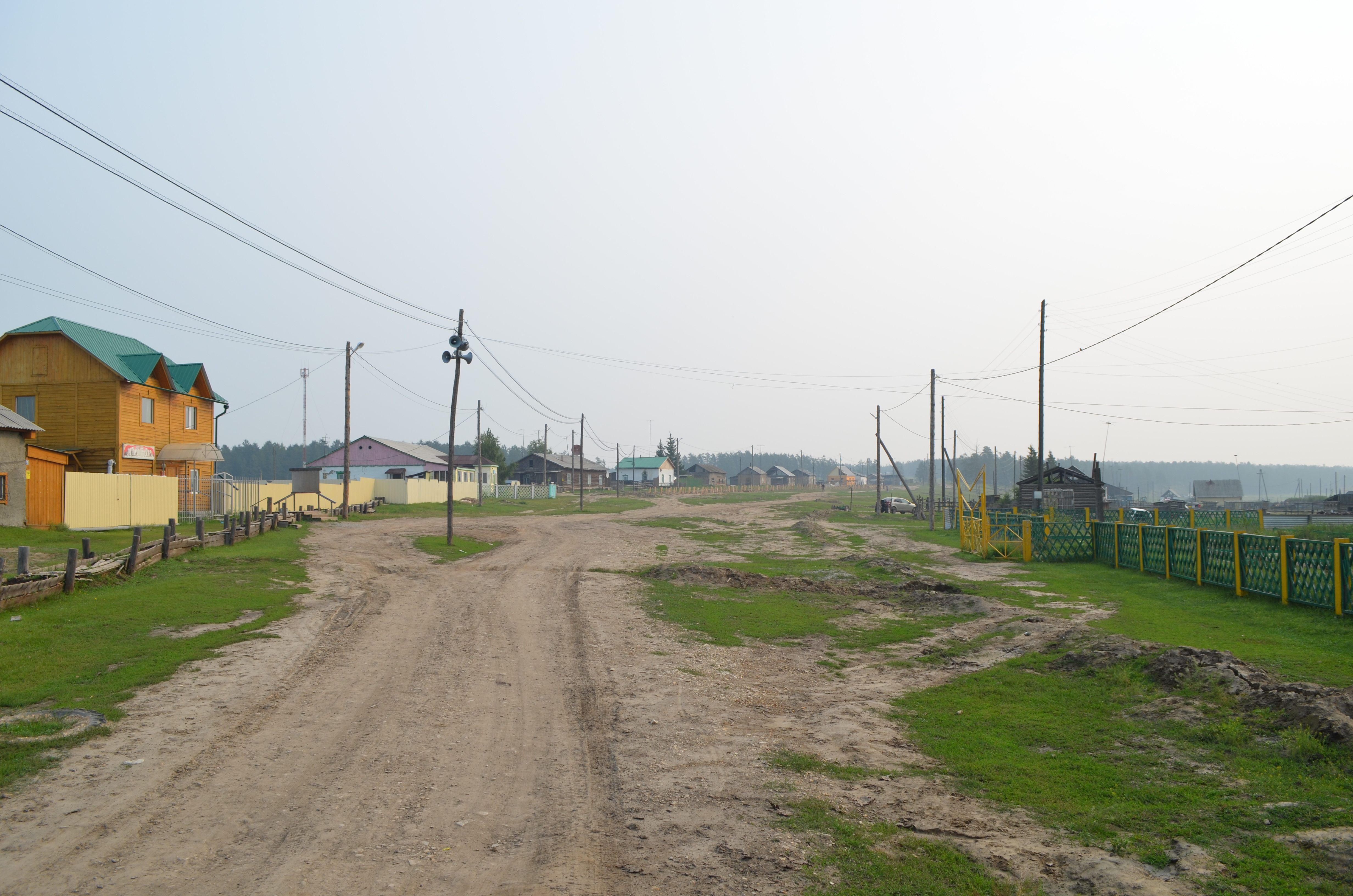 Село Майя Мегино-Кангаласского района Якутии. Крупное якутское село, население (на 2016) приближается к 10 тысячам жителей. В 1930-2007 годах село было центром Мегино-Кангаласского района (улуса). Населяют село преимущественно якуты. Оно также является малой родиной автора этих снимков, хотя я не был тут с 1993 года, то есть 23 года! Понятно, что с тех пор оно очень изменилось.